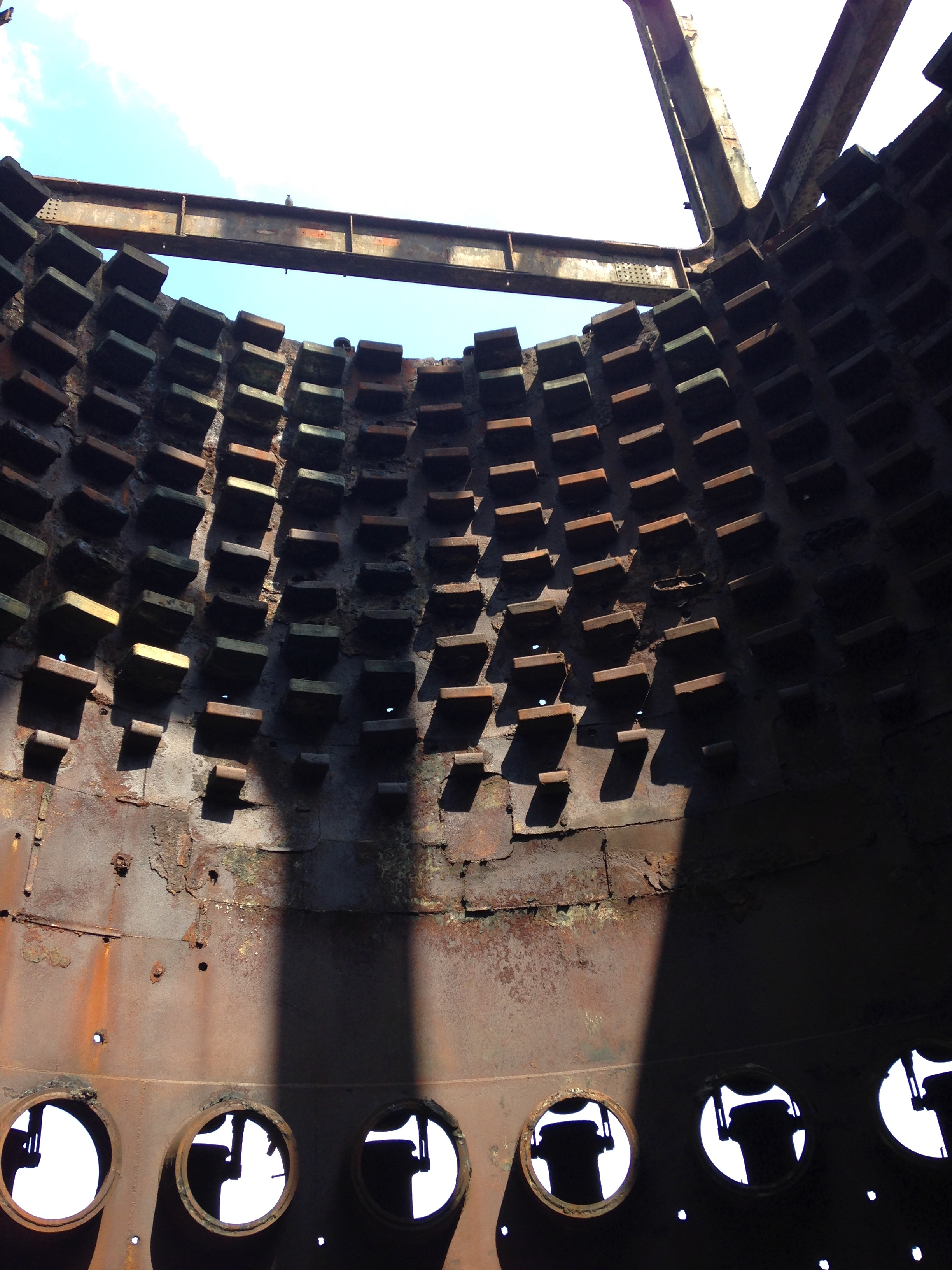 ehemaliges Hochofenwerk Phoenix-West in Dortmund, Ansicht im Hochofen